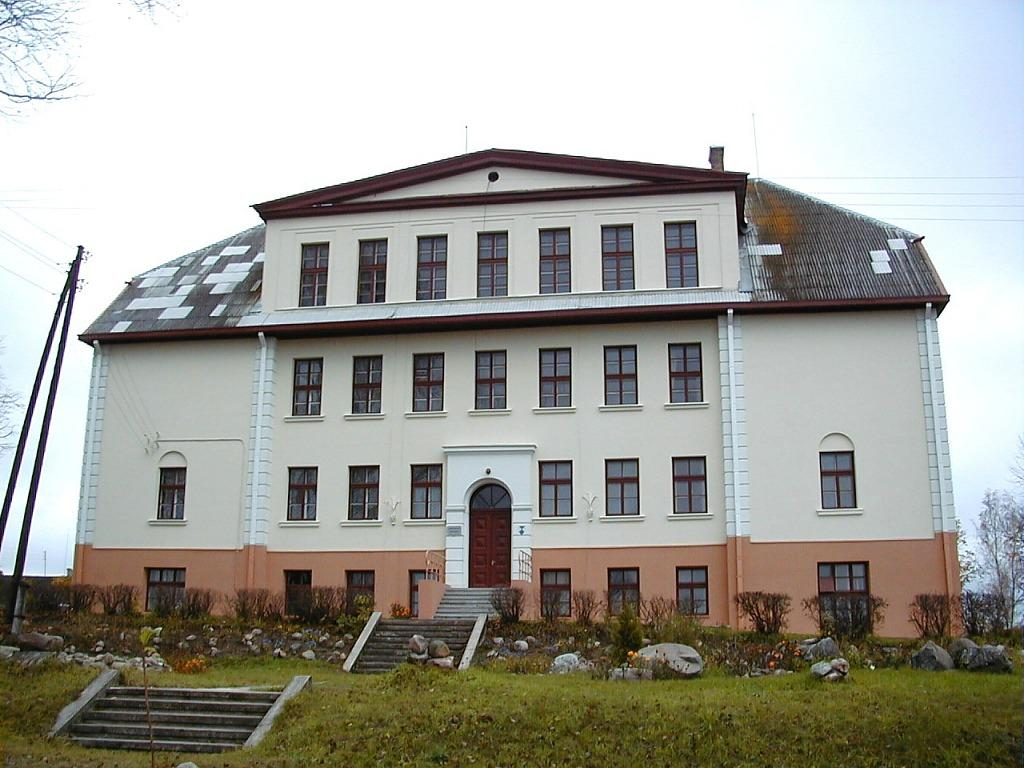 Skrudalienas skola 2000-10-15